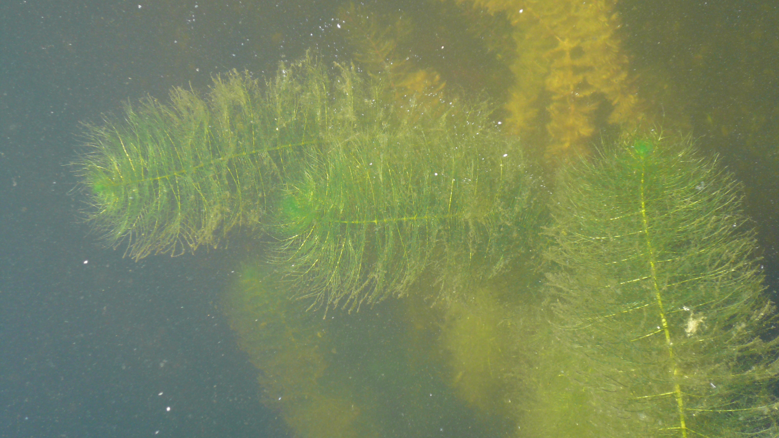 Wywłóczniki okółkowy i kłosowy (w tle) w jeziorze Ostrów na Pojezierzu Myśliborskim